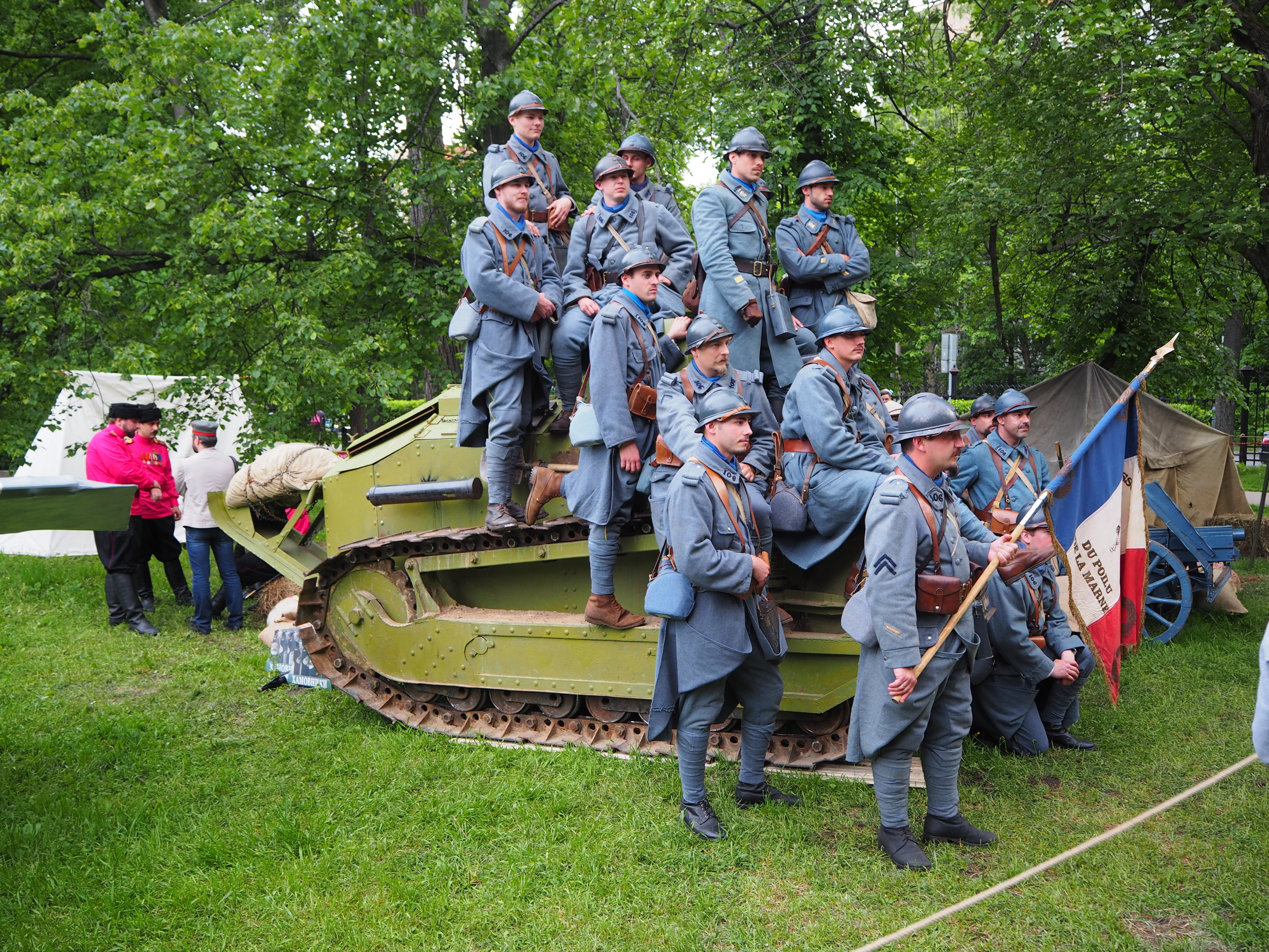 Фестиваль исторической реконструкции «Времена и эпохи. Собрание» в Мемориально-парковом комплексе героев Первой мировой войны.